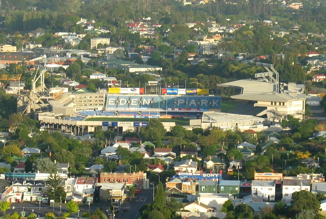 Eden Park, Auckland, New Zealand. Taken April 2005 from Mount Eden, Auckland.